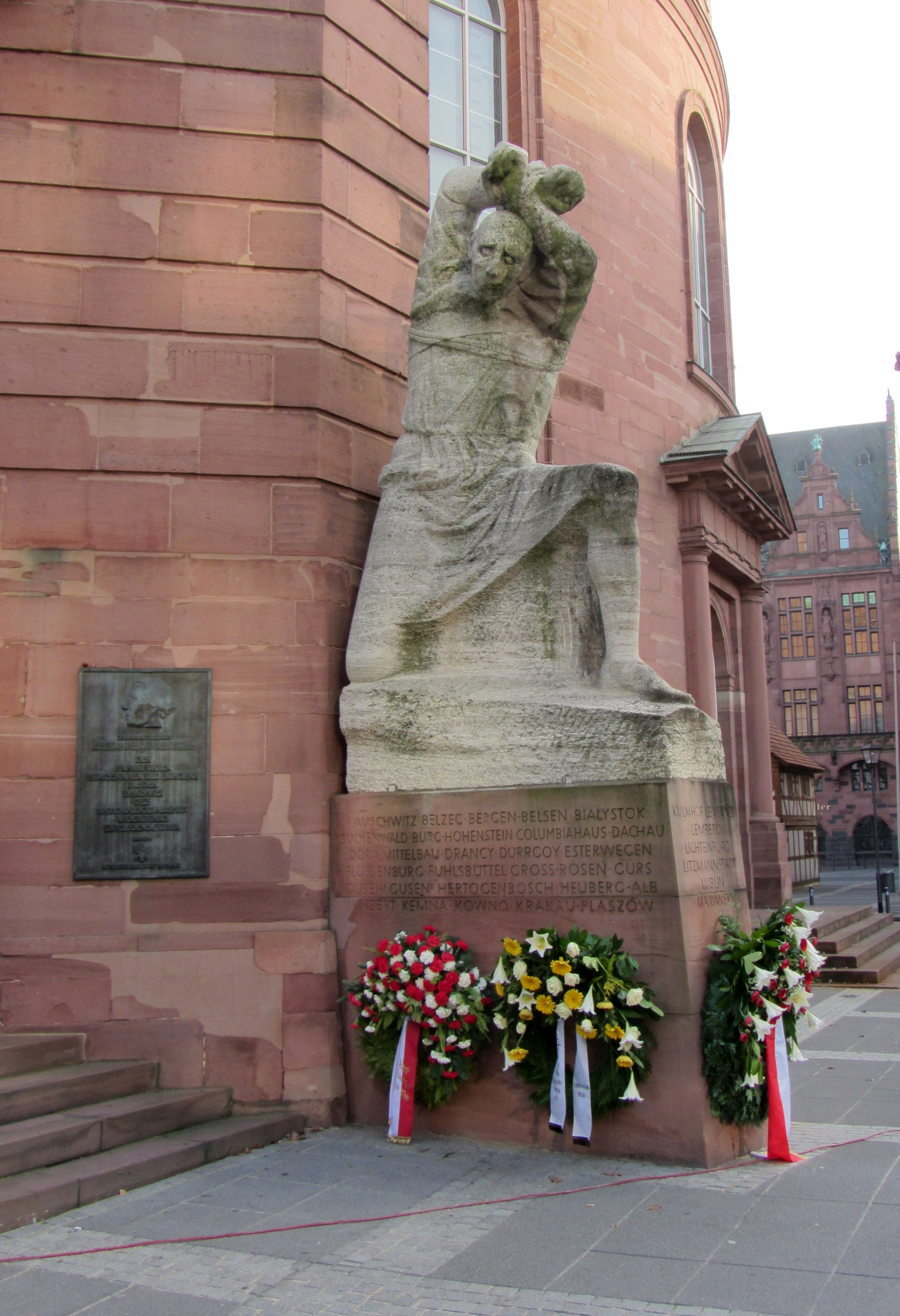 Frankfurt am Main, Paulskirche. Mahnmal für die Opfer des Nationalsozialismus von Hans Wimmer (1964)